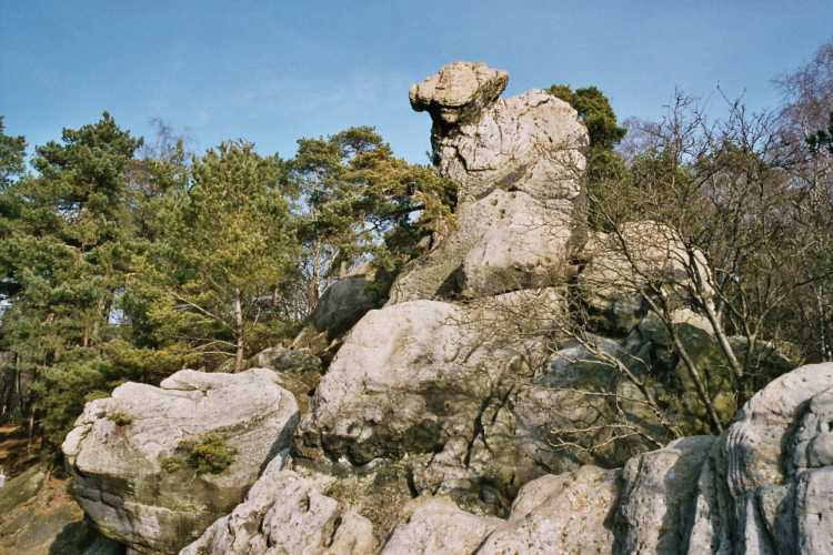 Das „Hockende Weib“ in den Dörenther Klippen, Ibbenbüren-Dörenthe, Kreis Steinfurt, Deutschland.